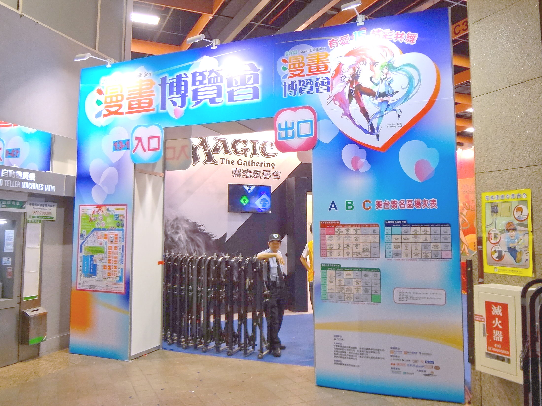 2014年（第15屆）漫畫博覽會13-1號出入口。拍攝時間正值本日活動結束，保全員守在拉門前管制人員出入。